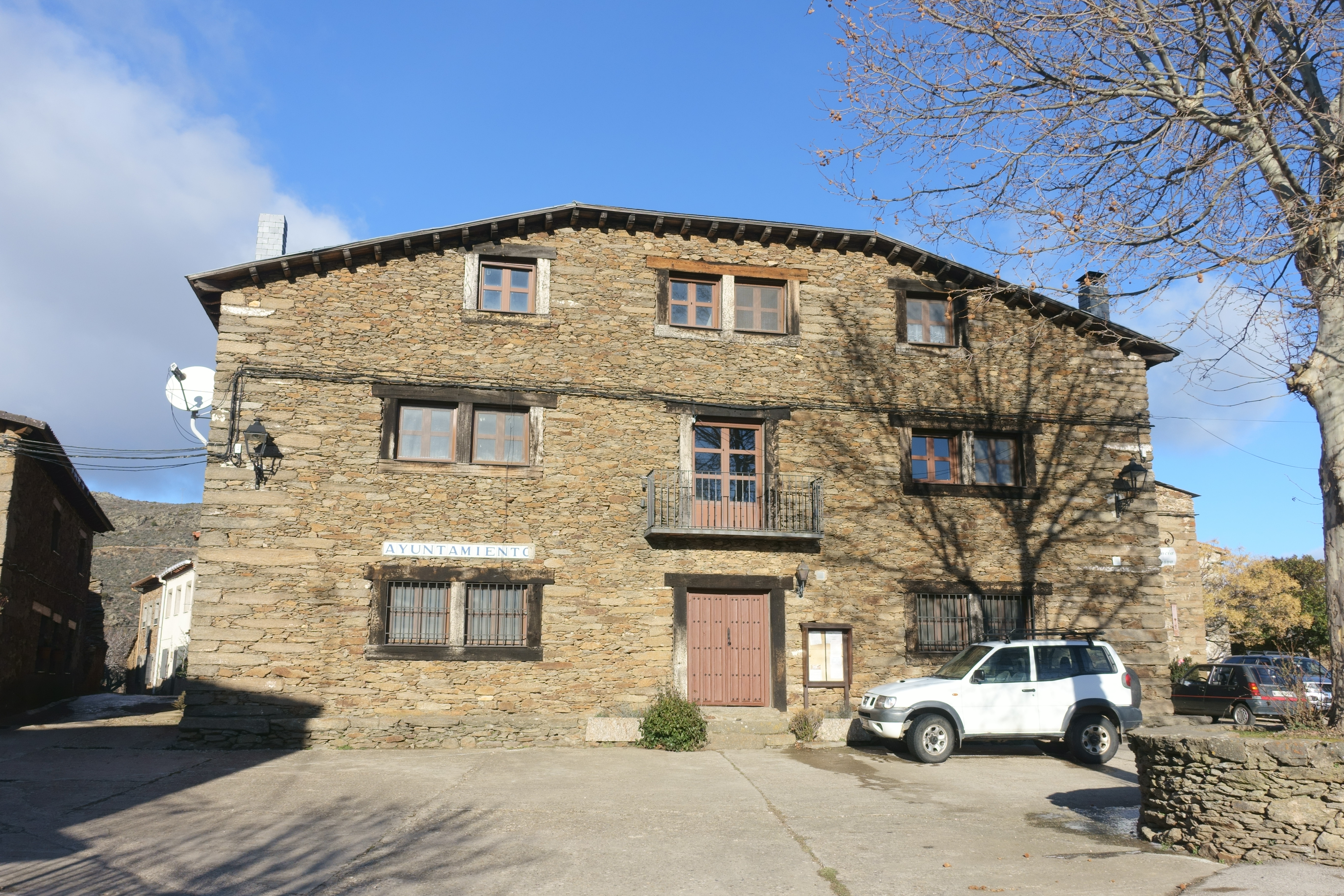 Casa consistorial de Gascueña de Bornova (Guadalajara, España).